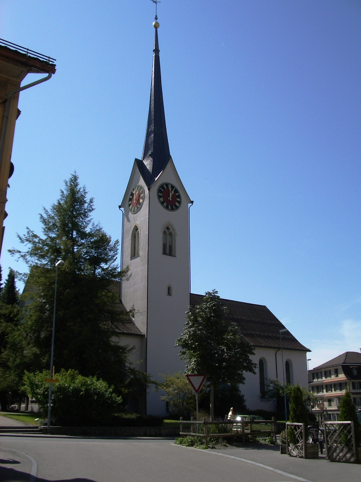 Reformierte Kirche, Wald ZH, Schweiz